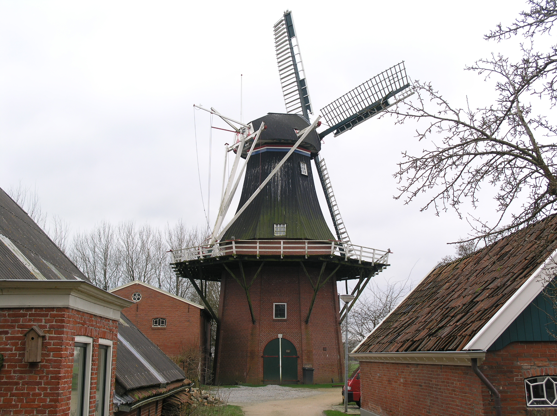 Zuurdijk Stellingmolen De Zwaluw